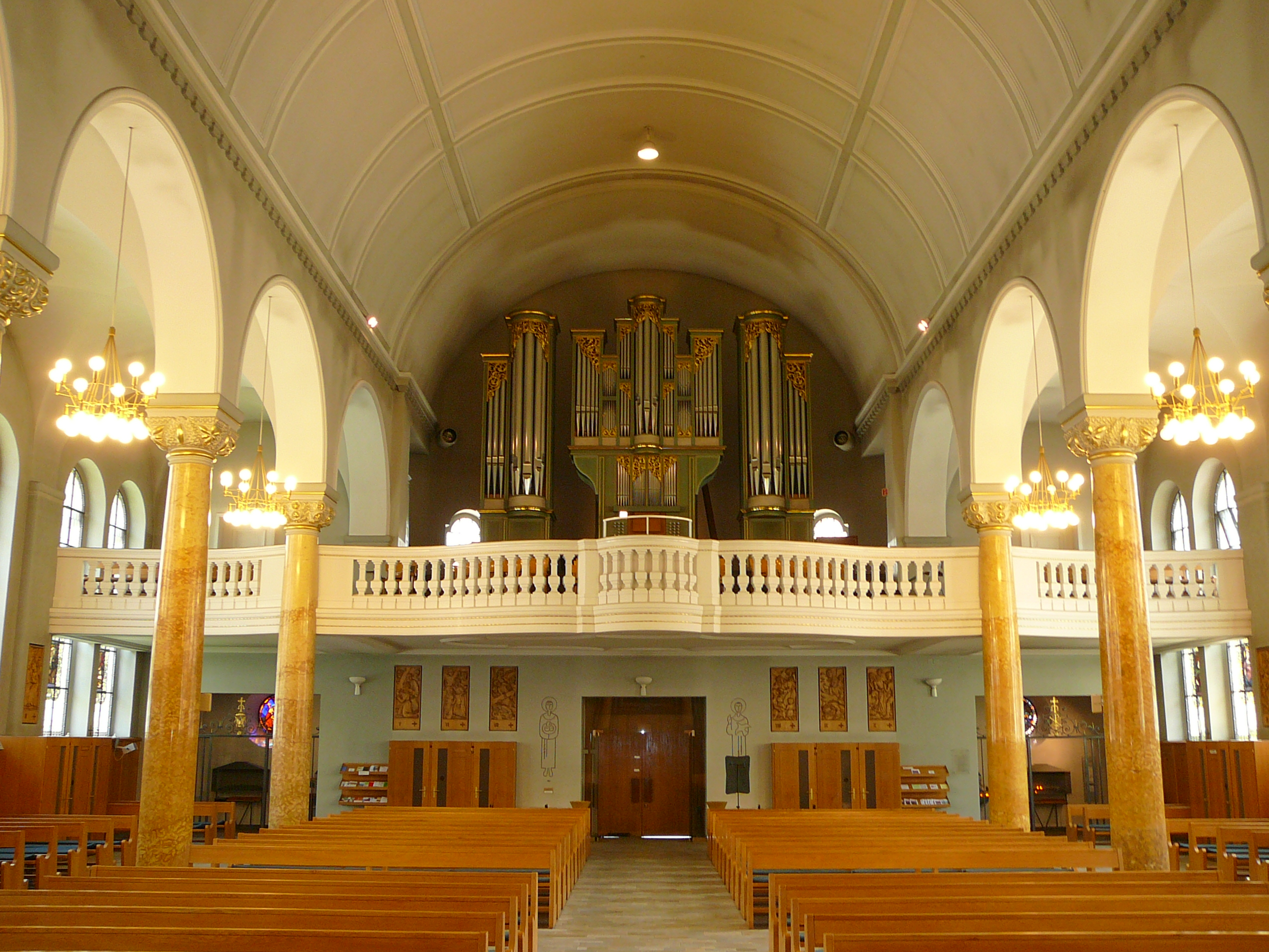 Römisch-katholische Kirche St. Josef Zürich-Industriequartier, Blick zur Orgelempore